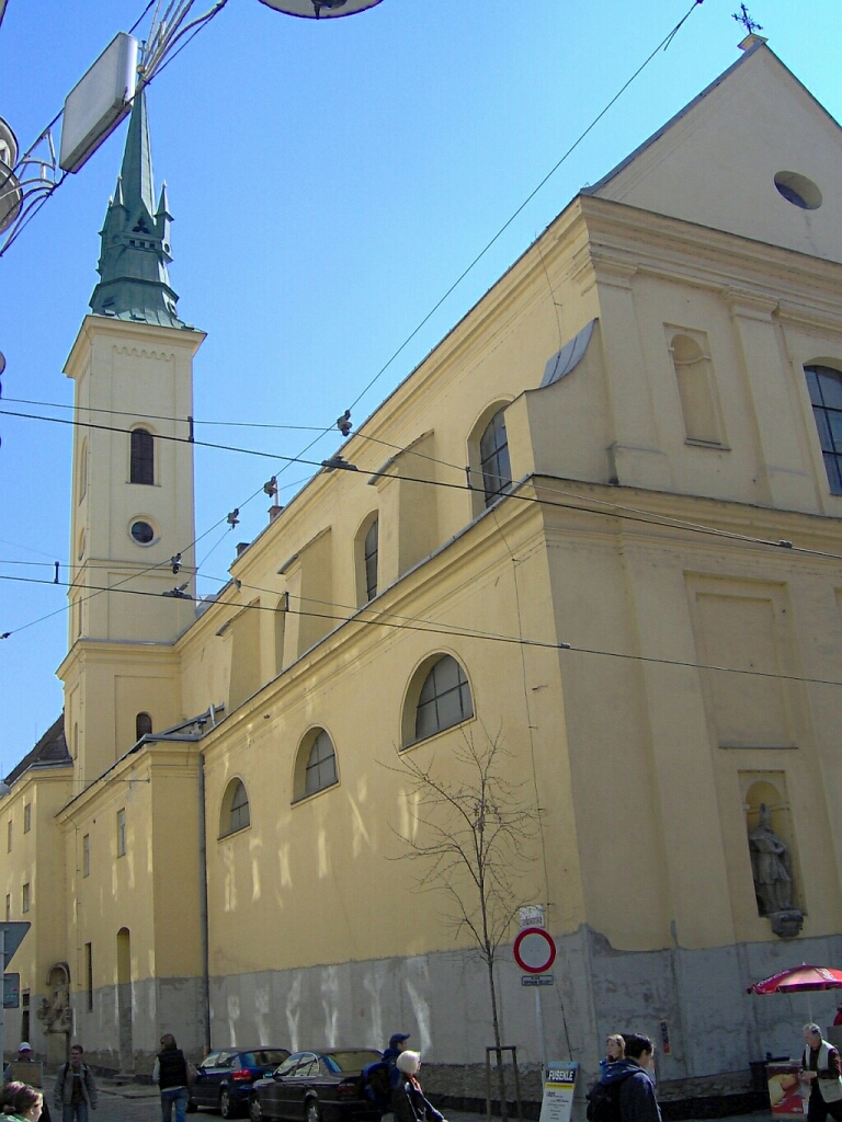 Kostel svaté Máří Magdalény v BrněBrno, Czech rep.